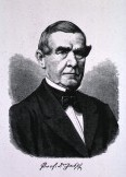 Anton von Jaksh